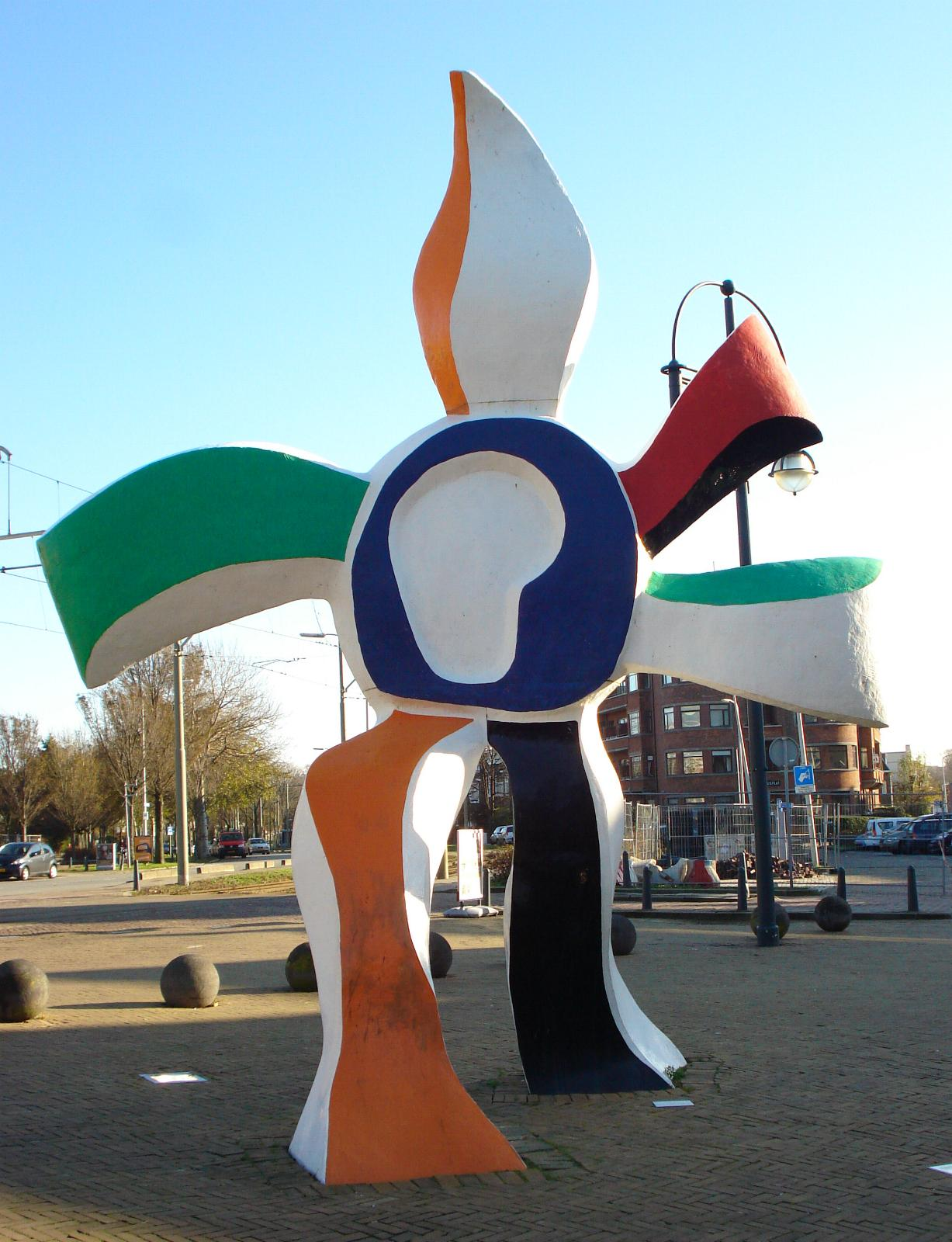 Scheveningen Circusplein. Kunstwerk "La Grande Fleur qui Marche" (1952) van Fernand Léger. The Hague/The Netherlands.